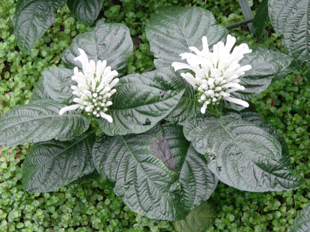 Brazilian Plume Flower (Justicia carnea)